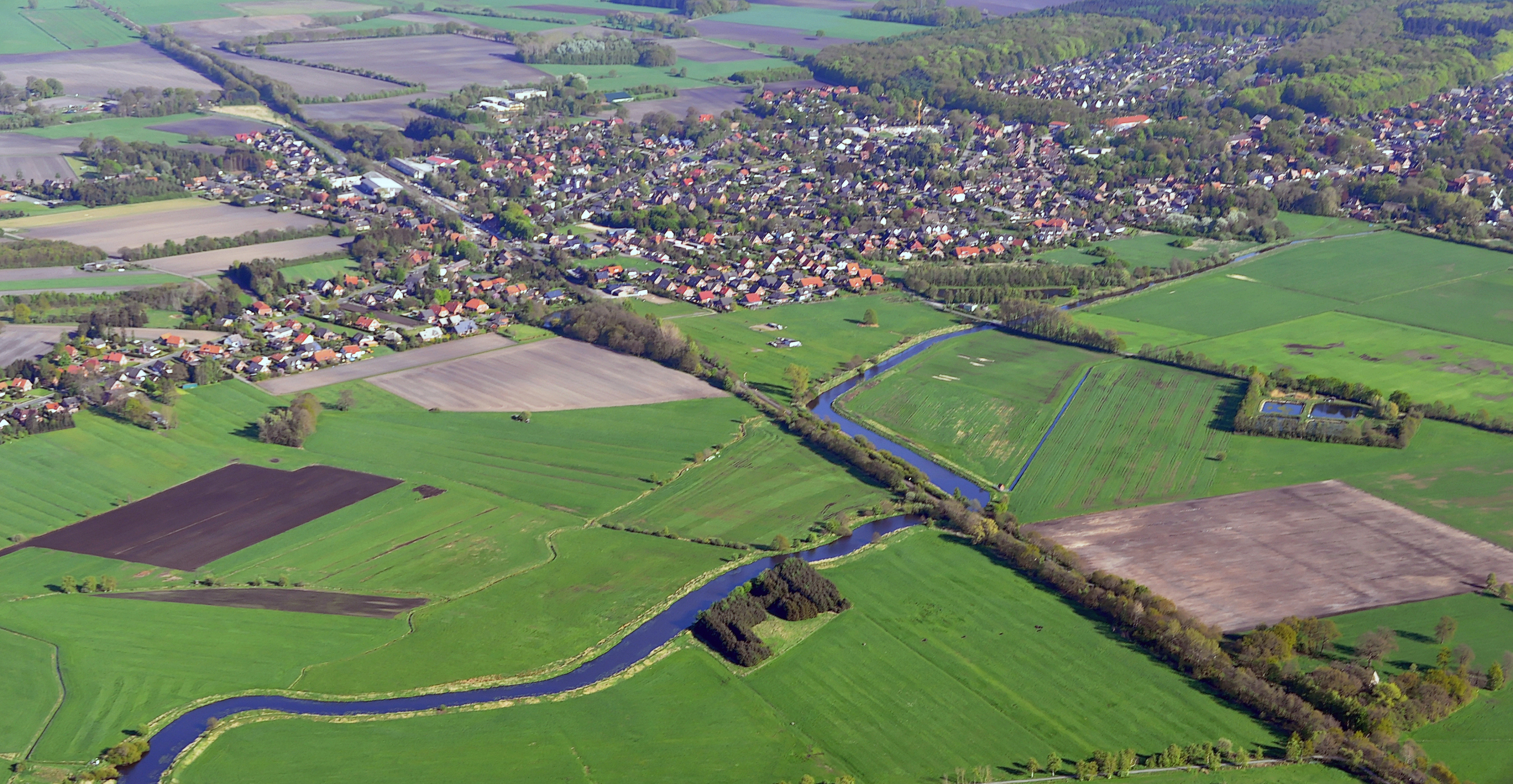 Luftbilder von der Nordseeküste 2012-05